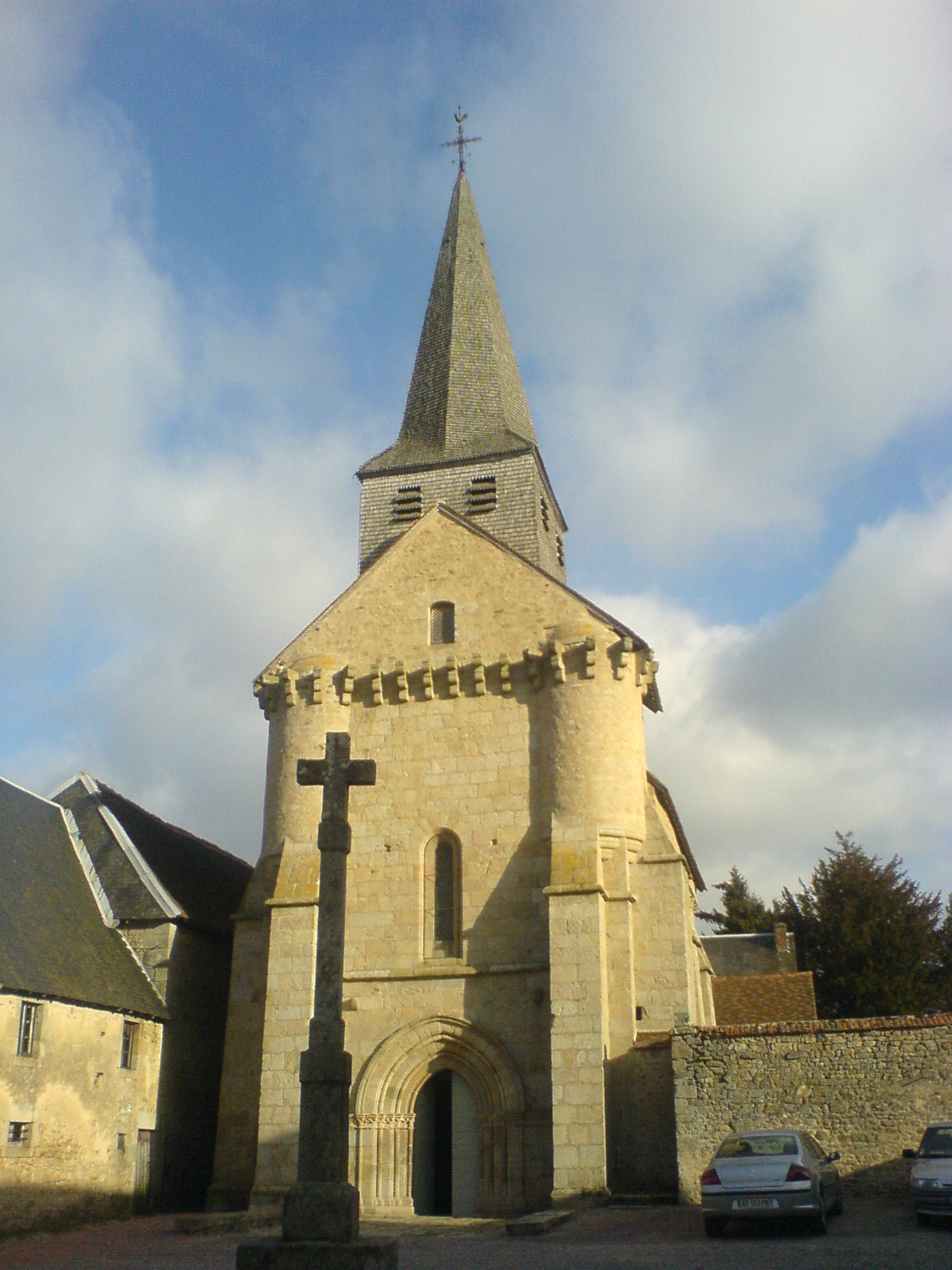 Eglise